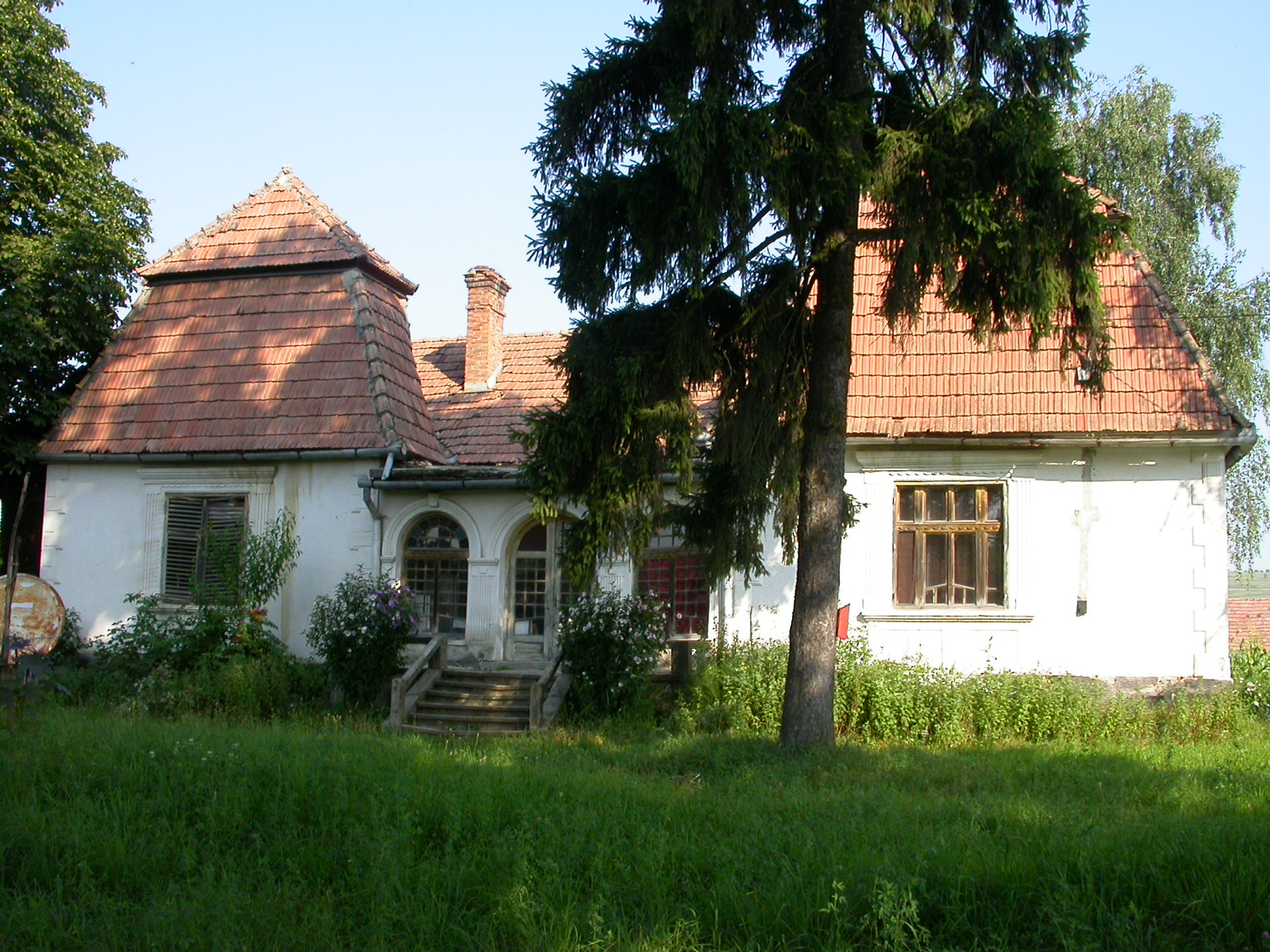 Casă (Conacul Pap)